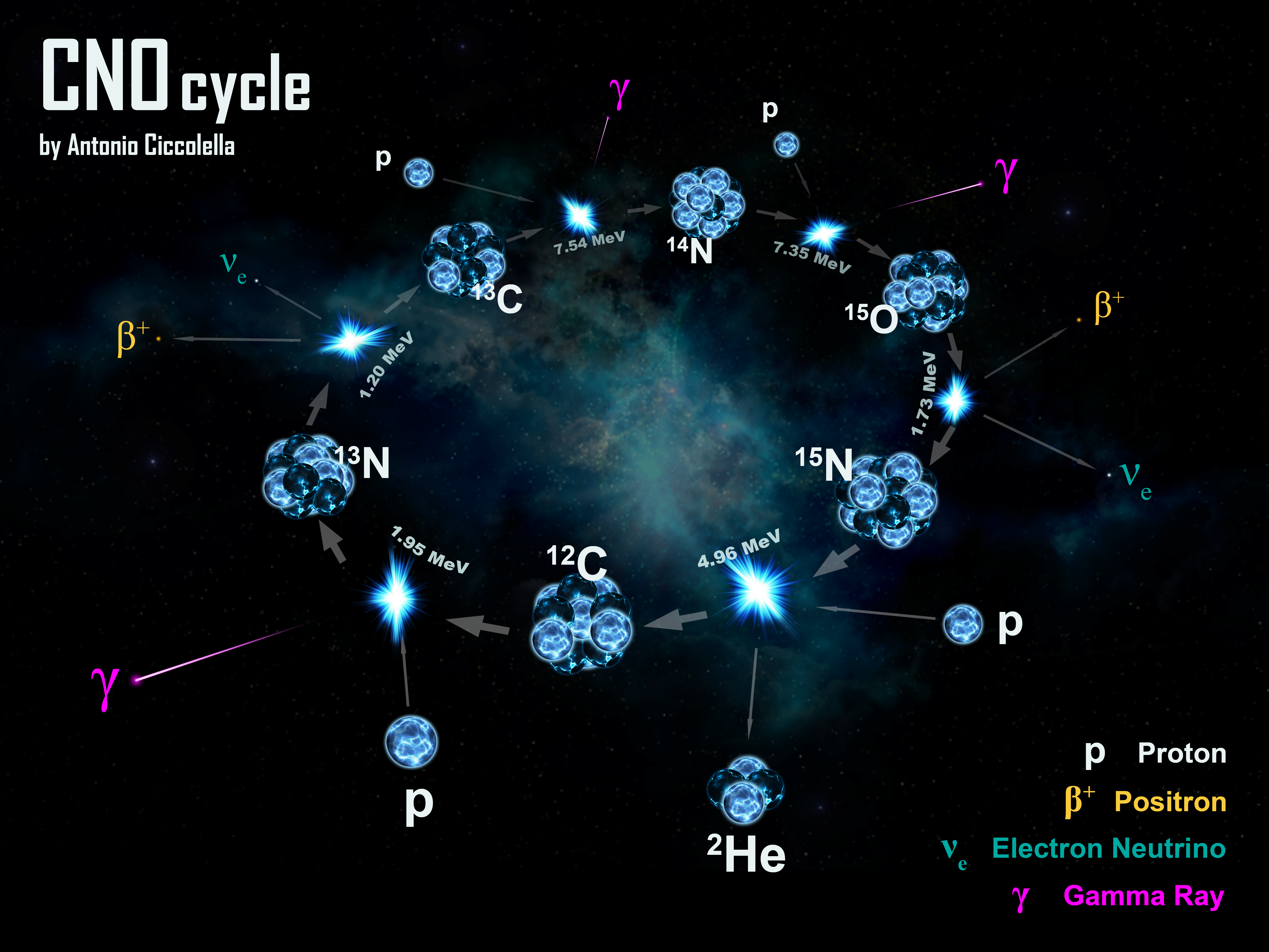 Carbon-Nitrogen-Oxygen Cycle-1